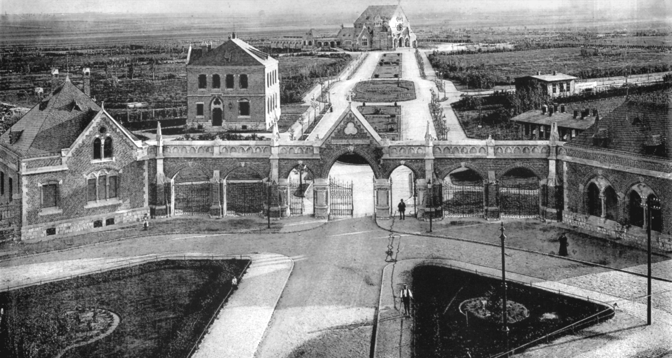 Eingangsbereich des Westfriedhofs Magdeburg um die Jahrhundertwende